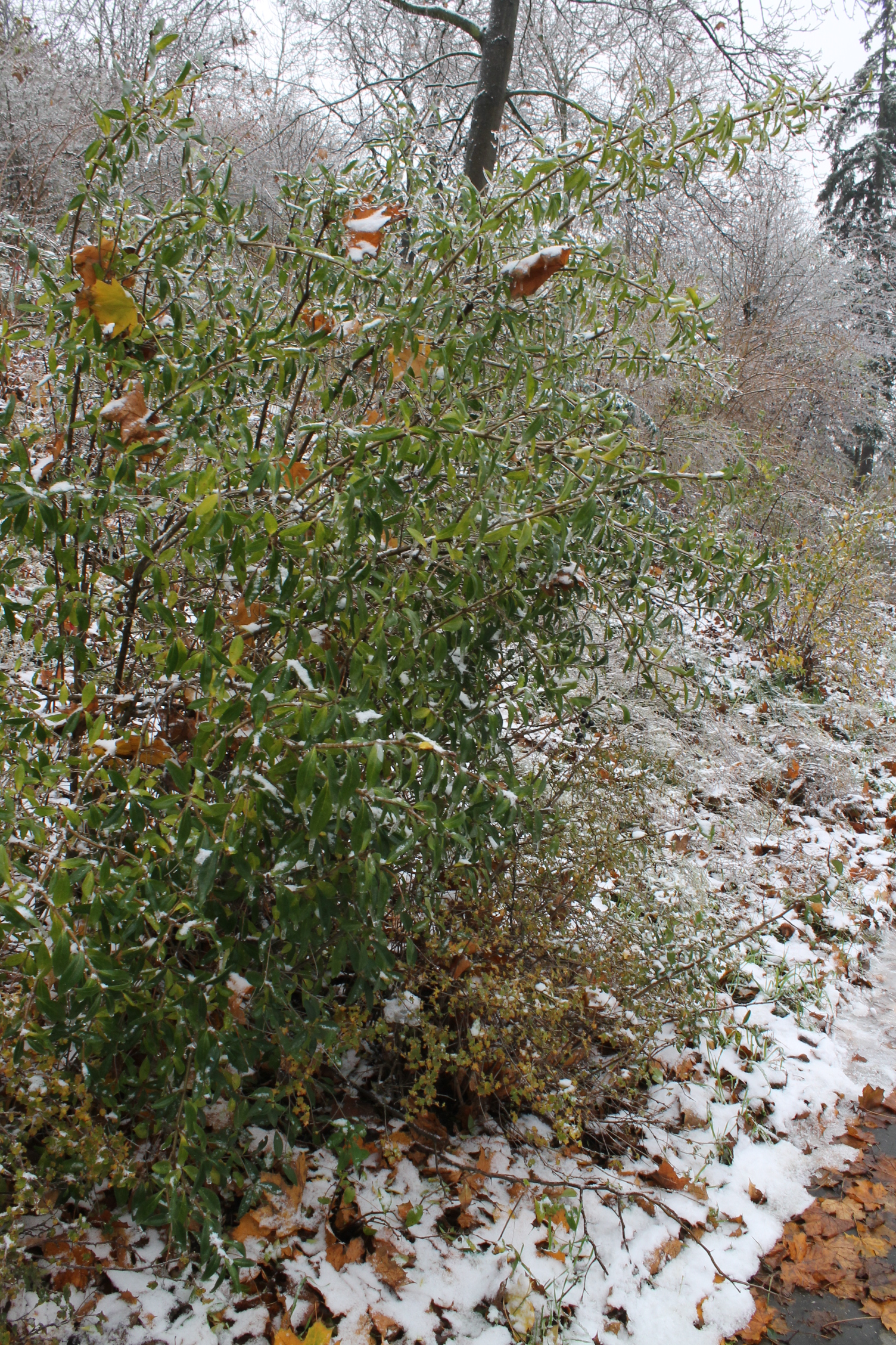 ptačí zob prosinec 2014